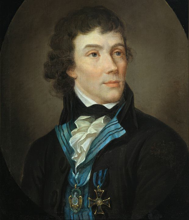 Беларуская (тарашкевіца): Партрэт Тадэвуша Касьцюшкі (Tadevuš Kaściuška)